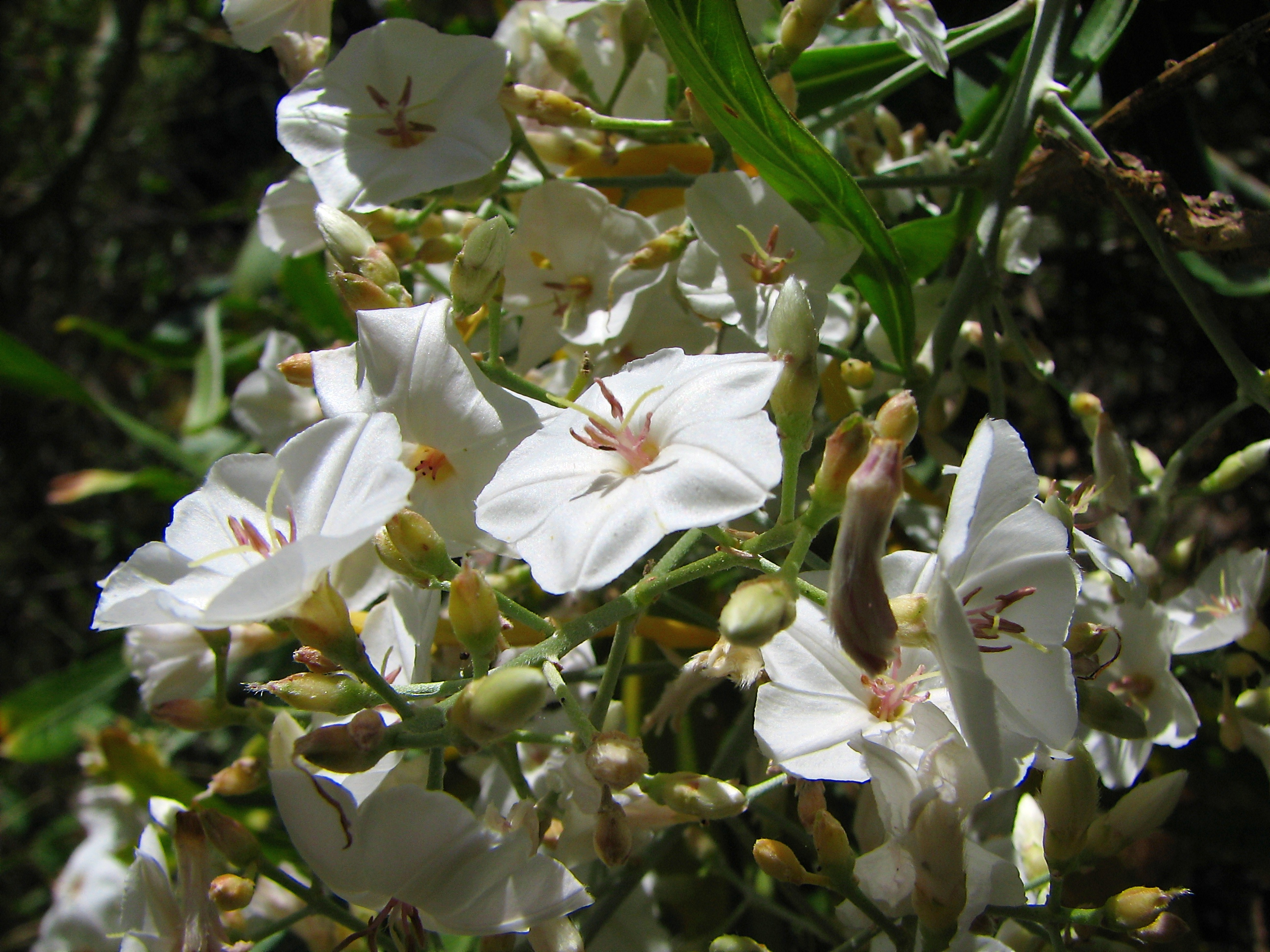 Convolvulus floridus, Guaidil. Barranco de Guerra, Santa Cruz de Tenerife.